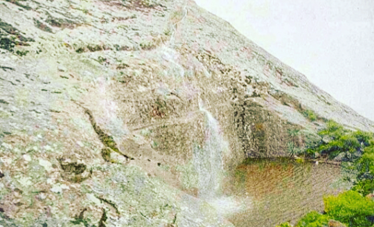 Əlincə qalasının su hovuzu